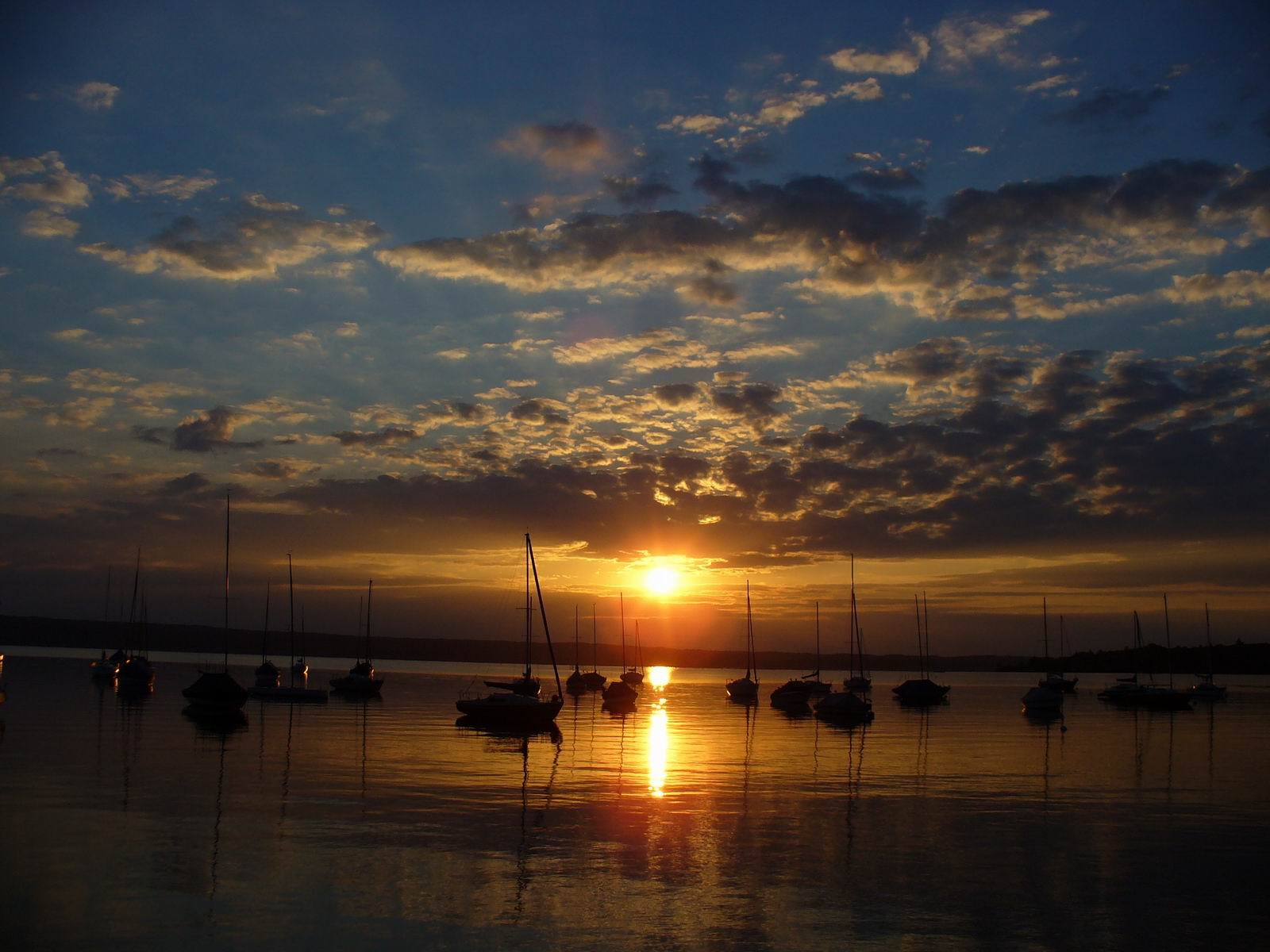 Sonnenuntergang über der Herrschinger Bucht